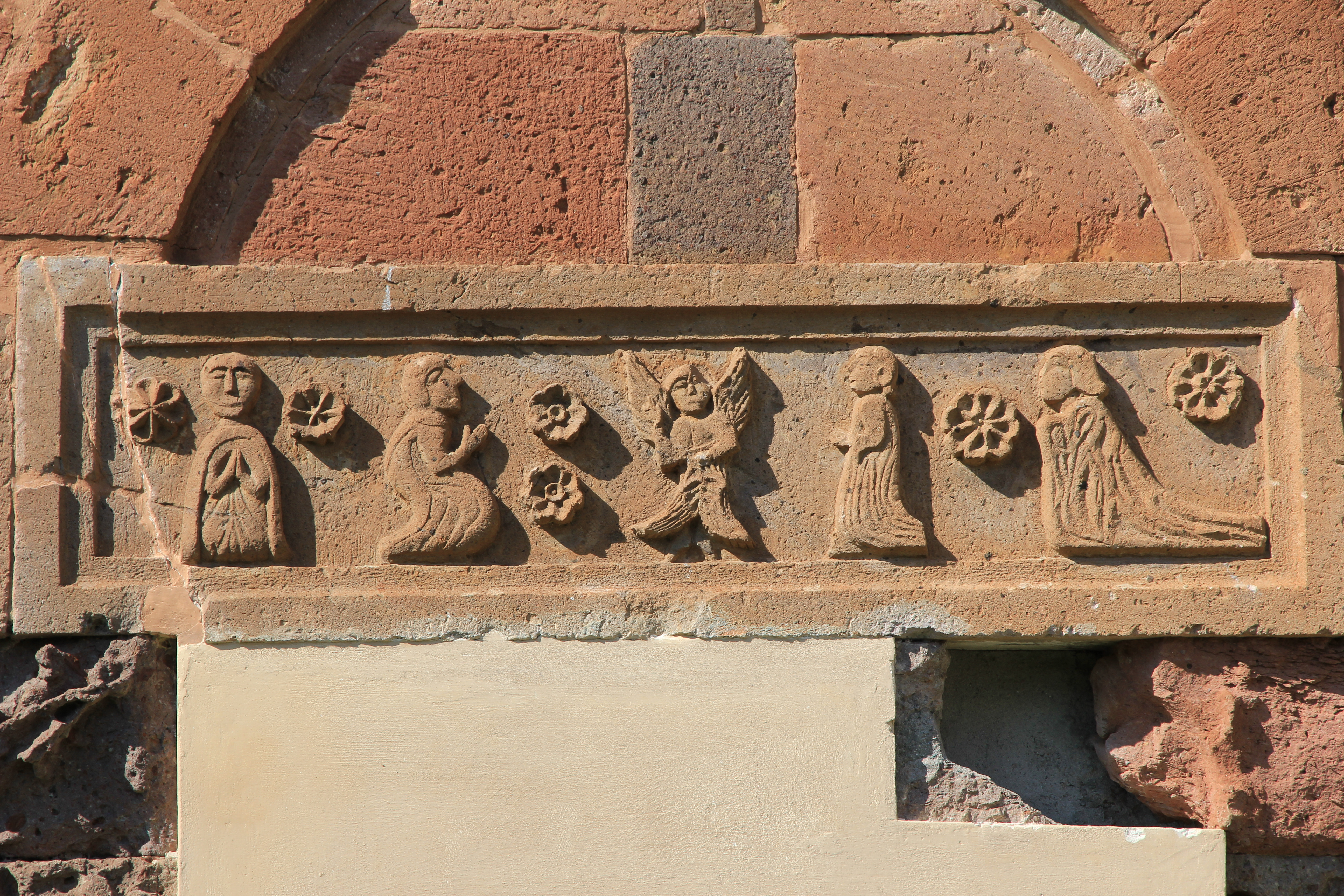 Ghilarza - Chiesa di San Serafino (novenario)